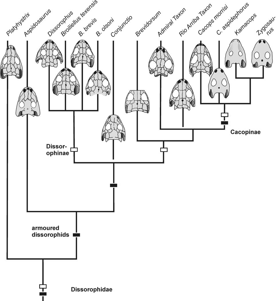 Dissorophidae skulls